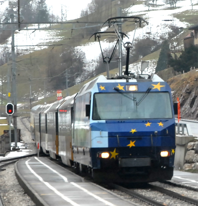 Montreux-Berner Oberland-Bahn (MOB) locomotief Ge 800x op 8 februari 2007 te Montbovon